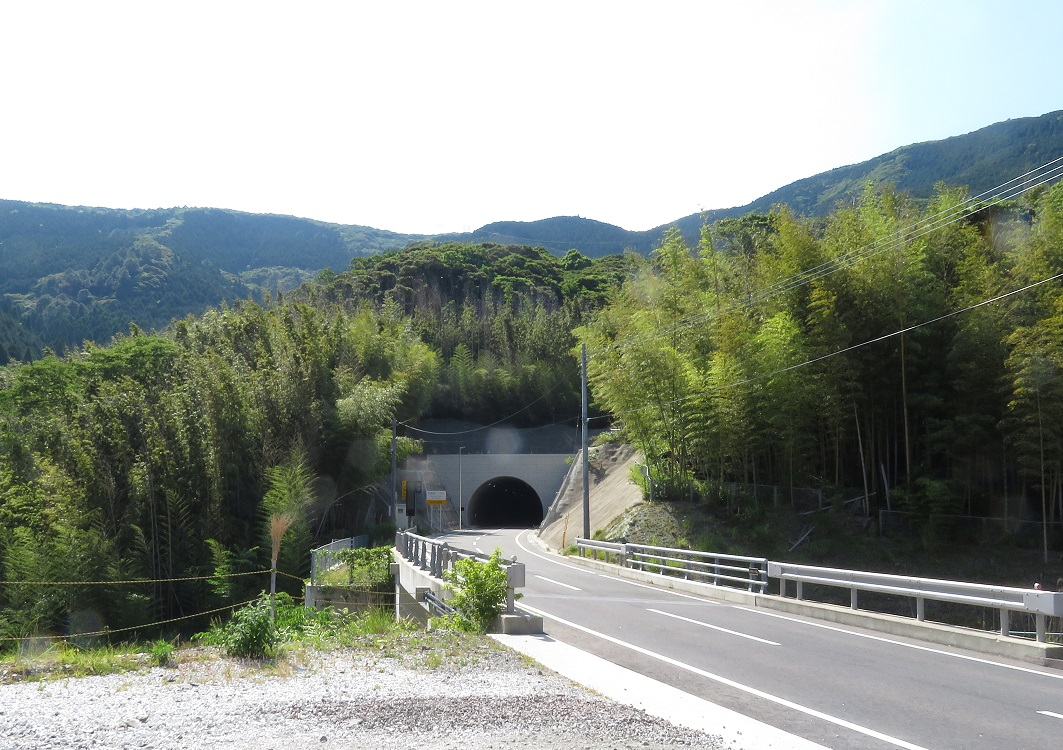 佐須坂トンネル（対馬市最長のトンネル 2015年完成）